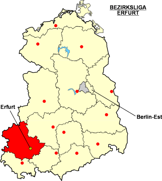 Localisation d'Erfurt dans la "Bezriksliga Erfurt" à l'époque de la RDA Catégorie:Logo de clubs de football - Allemagne